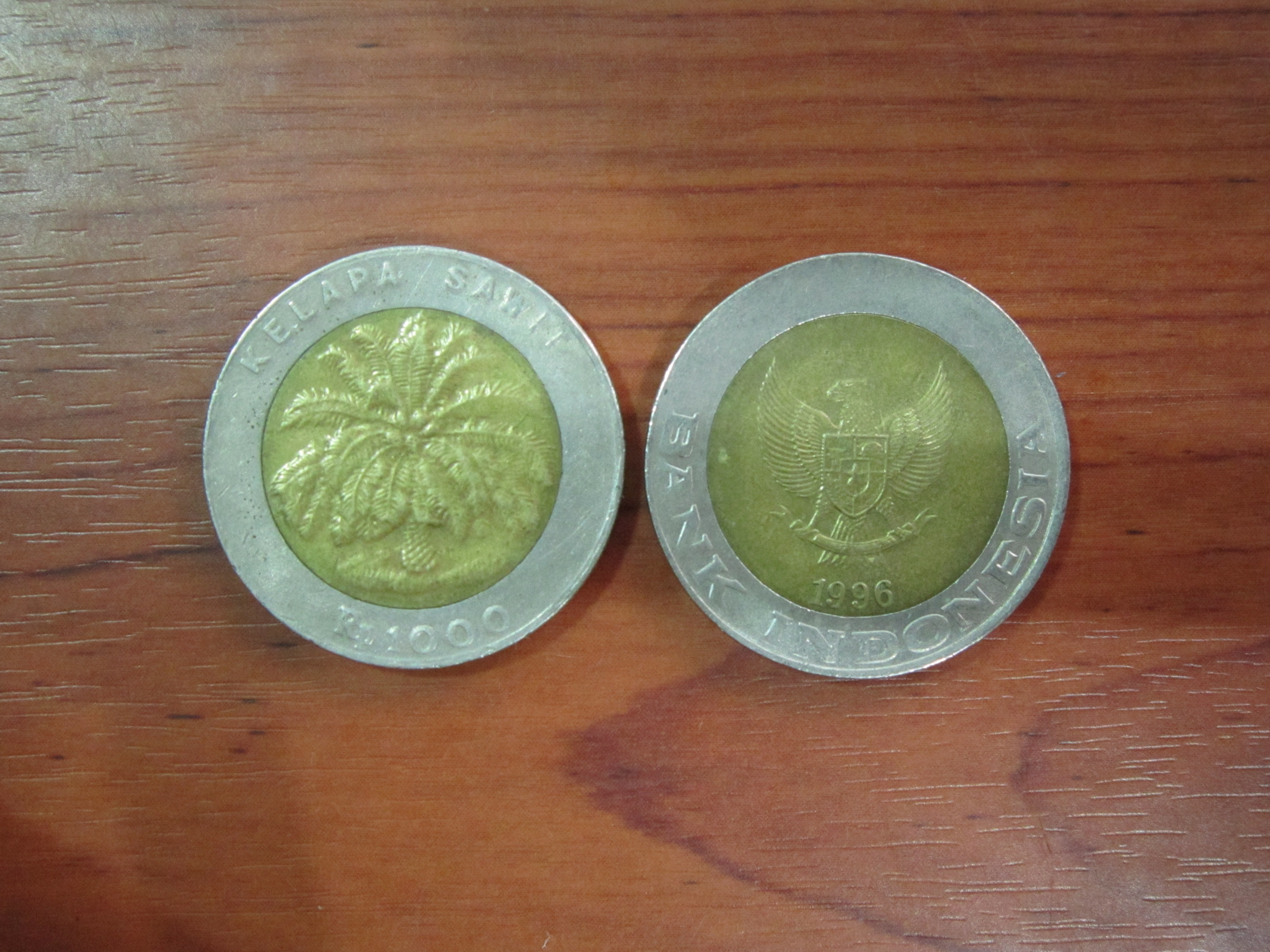 IDR 1000 Koin 2